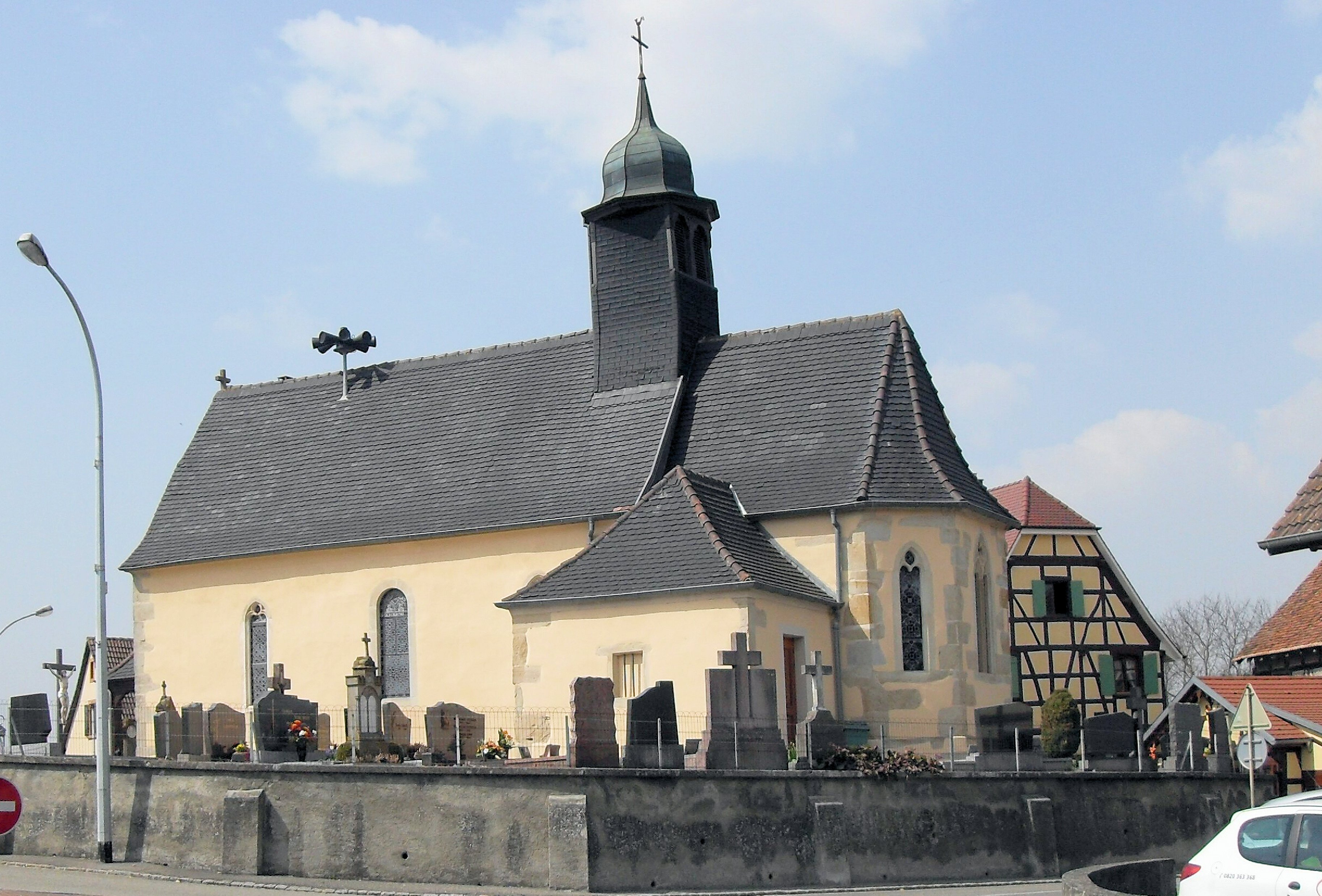 L'église Saint-Jacques-le-Majeur à Knœringue